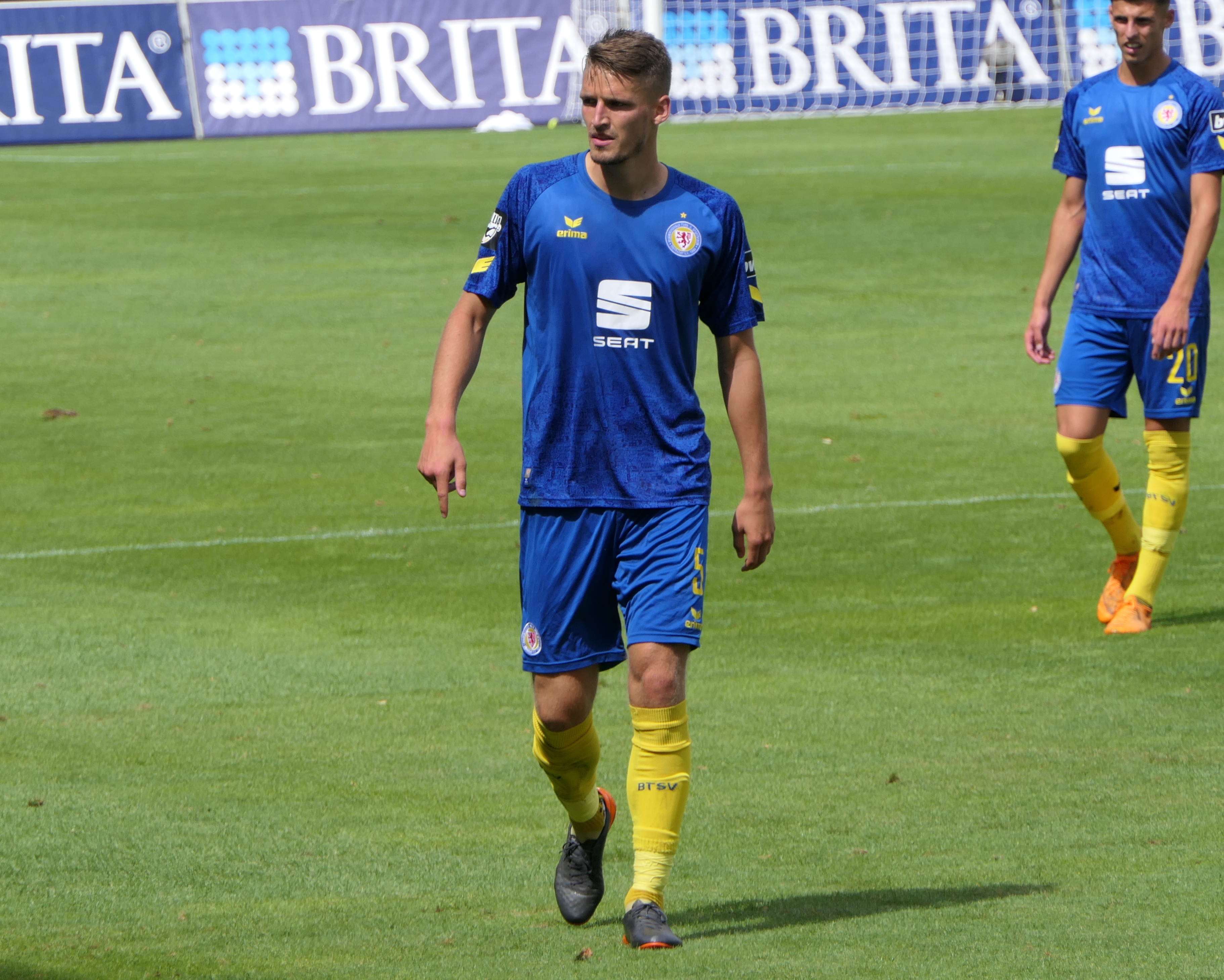 Der Fussballprofi Gustav Valsvik im Trikot von Eintracht Braunschweig beim Auswärtsspiel beim SV Wehen Wiesbaden am 11.08.2018.